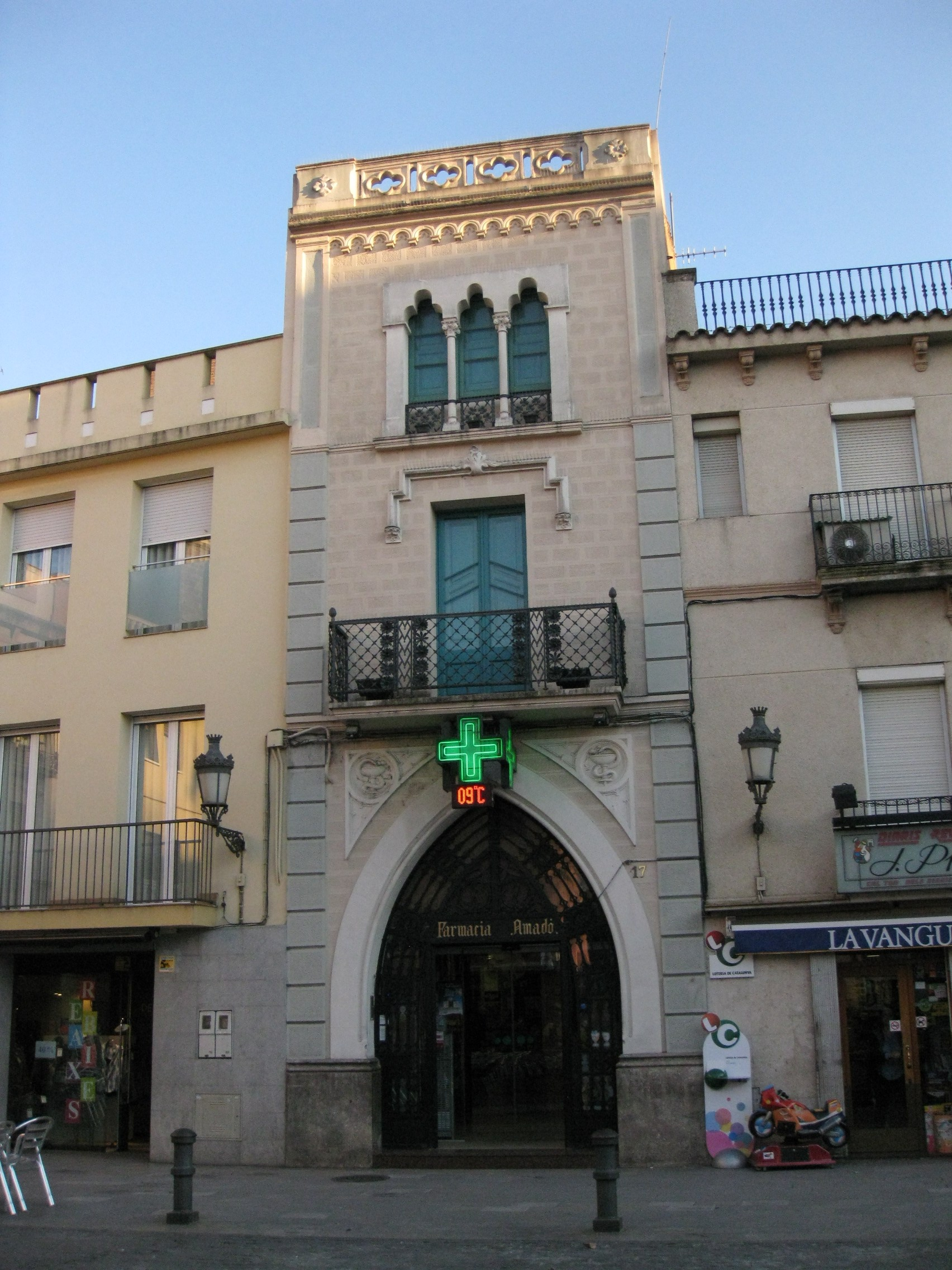 Farmàcia J. Amadó a la Plaça Prat de la Riba (Mollet del Vallès).